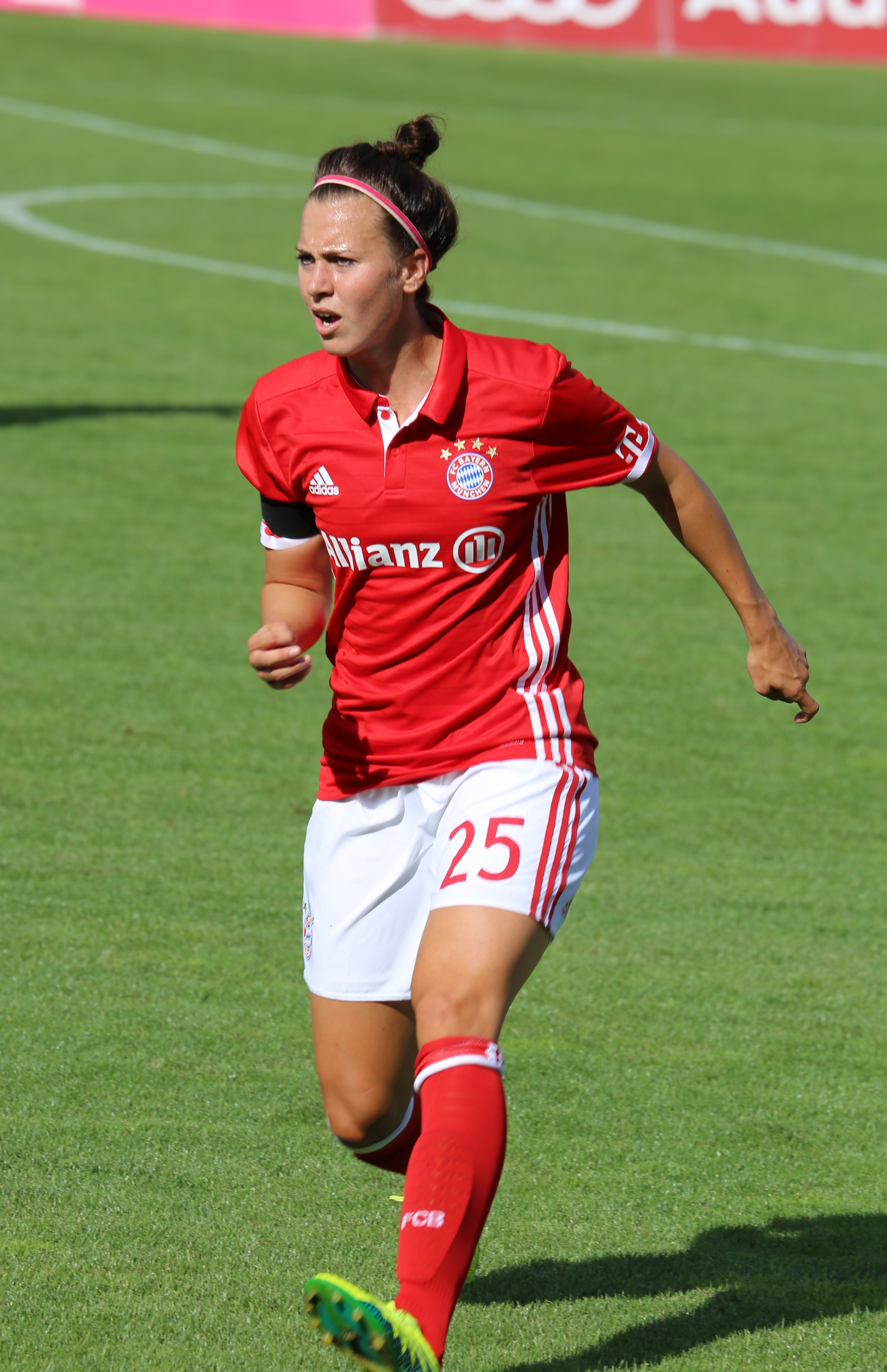 Viktoria Schnaderbeck, FC Bayern München, beim Frauen-Bundesliga-Spiel FC Bayern München gegen SC Freiburg am 3. September 2016 im Stadion an der Grünwalder Straße (Ergebnis war 1:1).